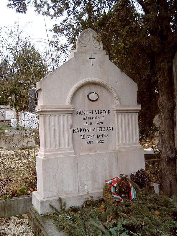 Rákosi Viktor, Kremsner (Ukk, 1860. szept. 20. – Bp., 1923. szept. 15.): író, újságíró, humorista sírja Budapesten. Farkasréti temető: 49/5-1-3.